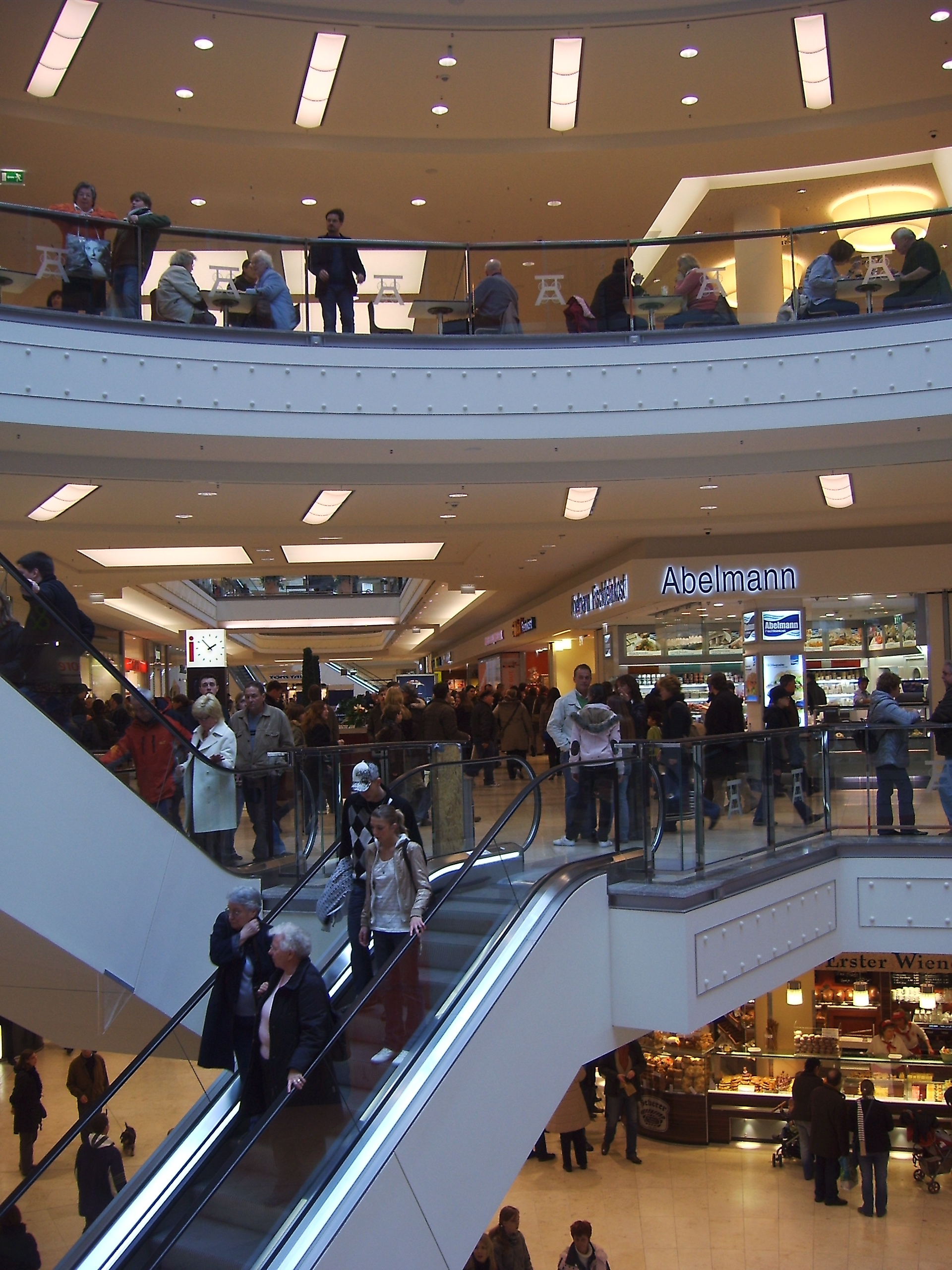 Karstadt Essen, Limbecker Platz neu, Innen, 1 Woche nach Eröffnung